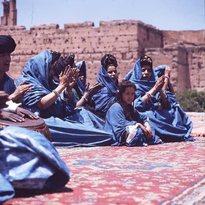 De vrouwendansgroep op de foto voert een guedra-dans uit. De vrouwen behoren tot de Reguibat, een bevolkingsgroep uit de huidige westelijke Sahara die zich als Arabisch identificeert. Ze spreken het Arabische dialect Hassania, een mengeling van Berbers en bedoeïenen Arabisch. Deze bevolkingsgroep stamt deels af van de Mâaquil, een oorspronkelijk uit Jemen afkomstige bevolkingsgroep die in de 11/12e eeuw vanuit het Arabisch schiereiland naar Noord-Afrika is geëmigreerd. Daarnaast stammen de Reguibat af van gearabiseerde Berberstammen (Sanhaja). In de cultuur van de Reguibat zijn vele Berberinvloeden te vinden, zoals de dans- en zangstijlen die verwant zijn aan die van de Touaregs in de Sahara.